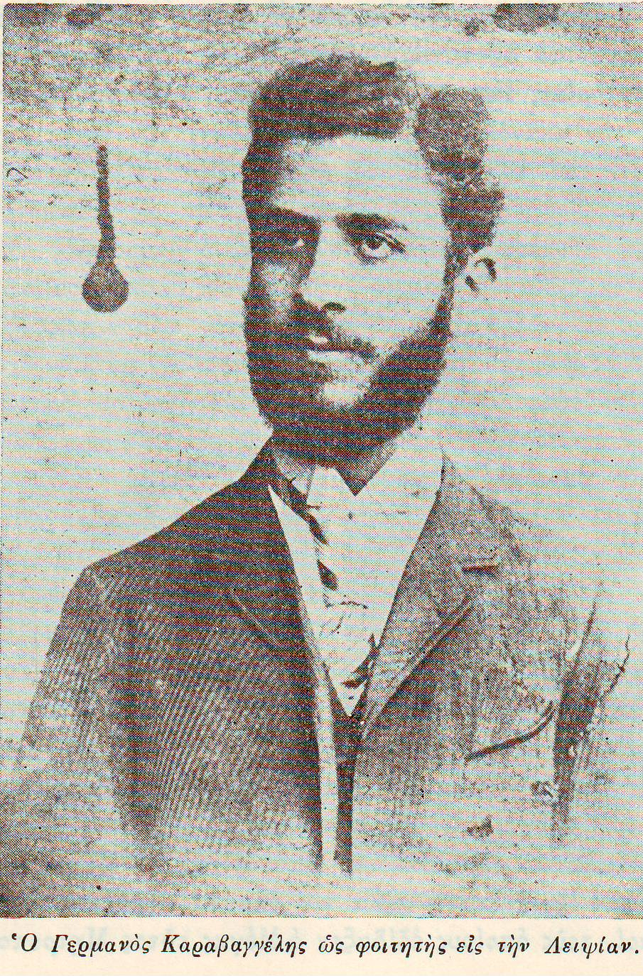 Германос Каравангелис в Лайпциг